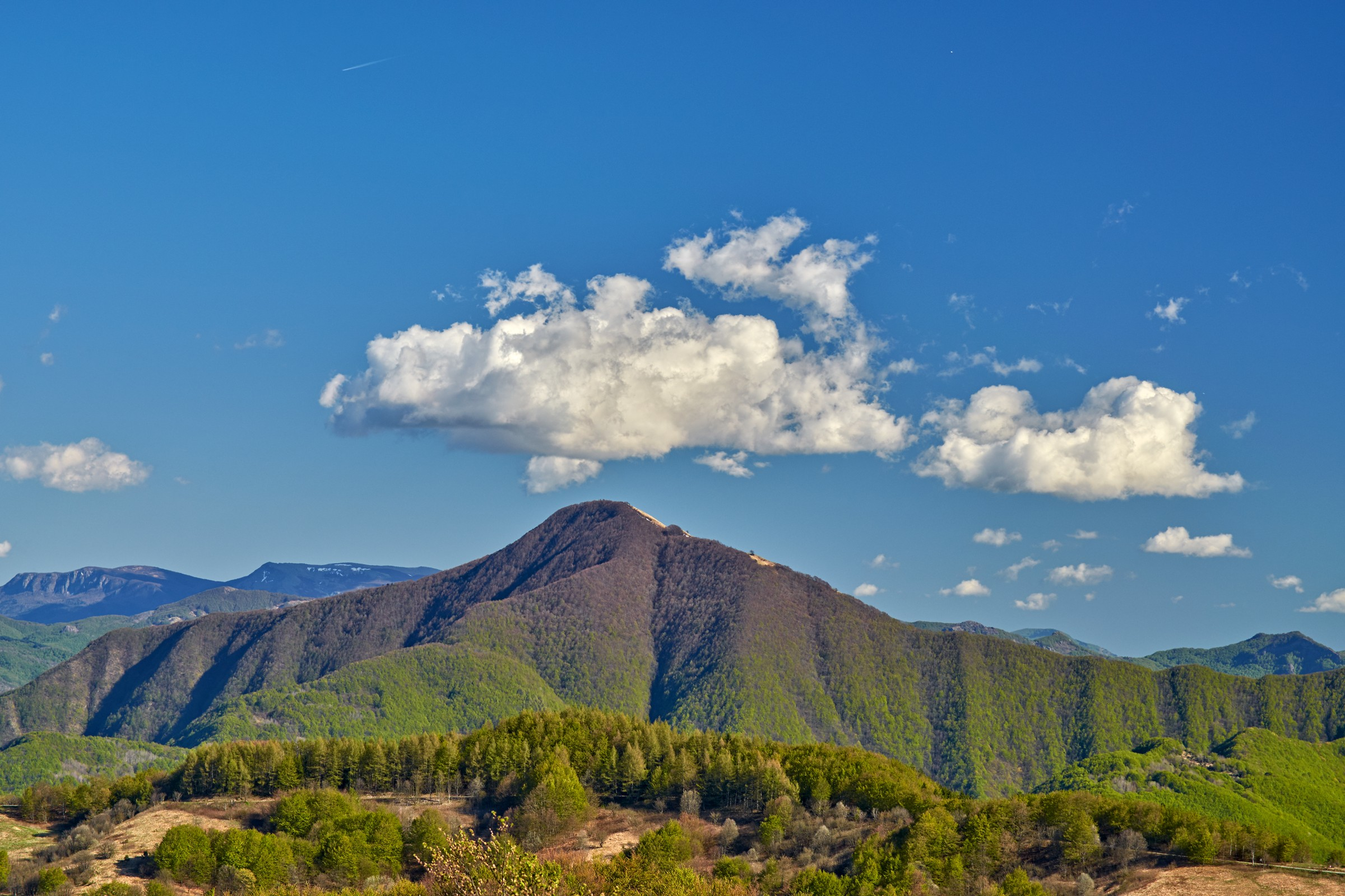 Monte Alfeo (telefoto)